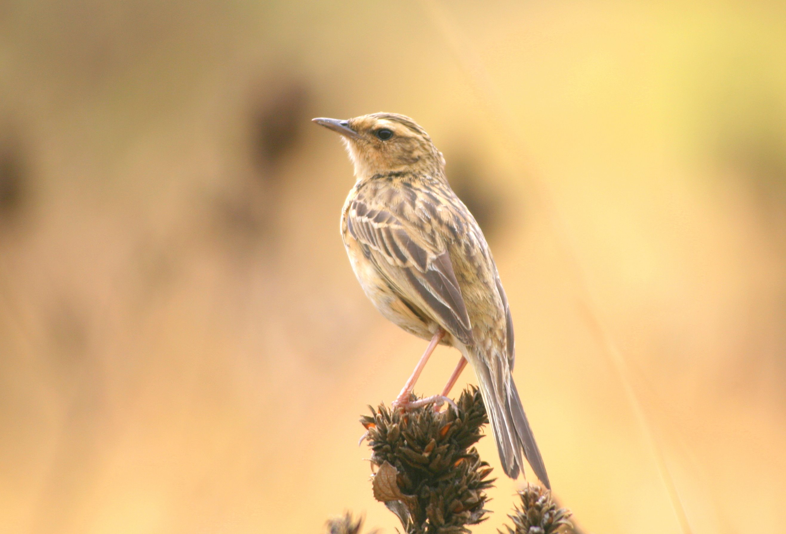 Nilgiri Pipit (Anthus nilghiriensis)